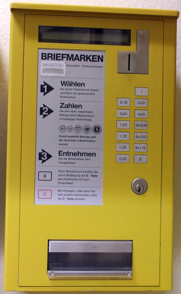 Briefmarkenautomat der Deutschen Bundespost, heute ein Exponat im Postmuseum Rheinhessen